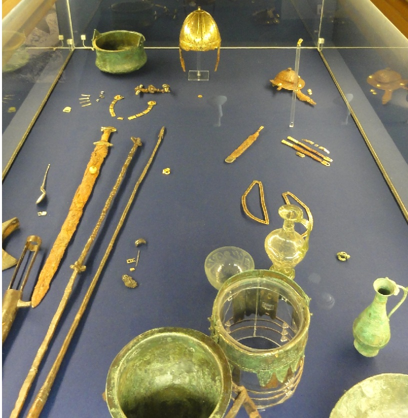 Inhalt Fuerstengrab Burg Linn